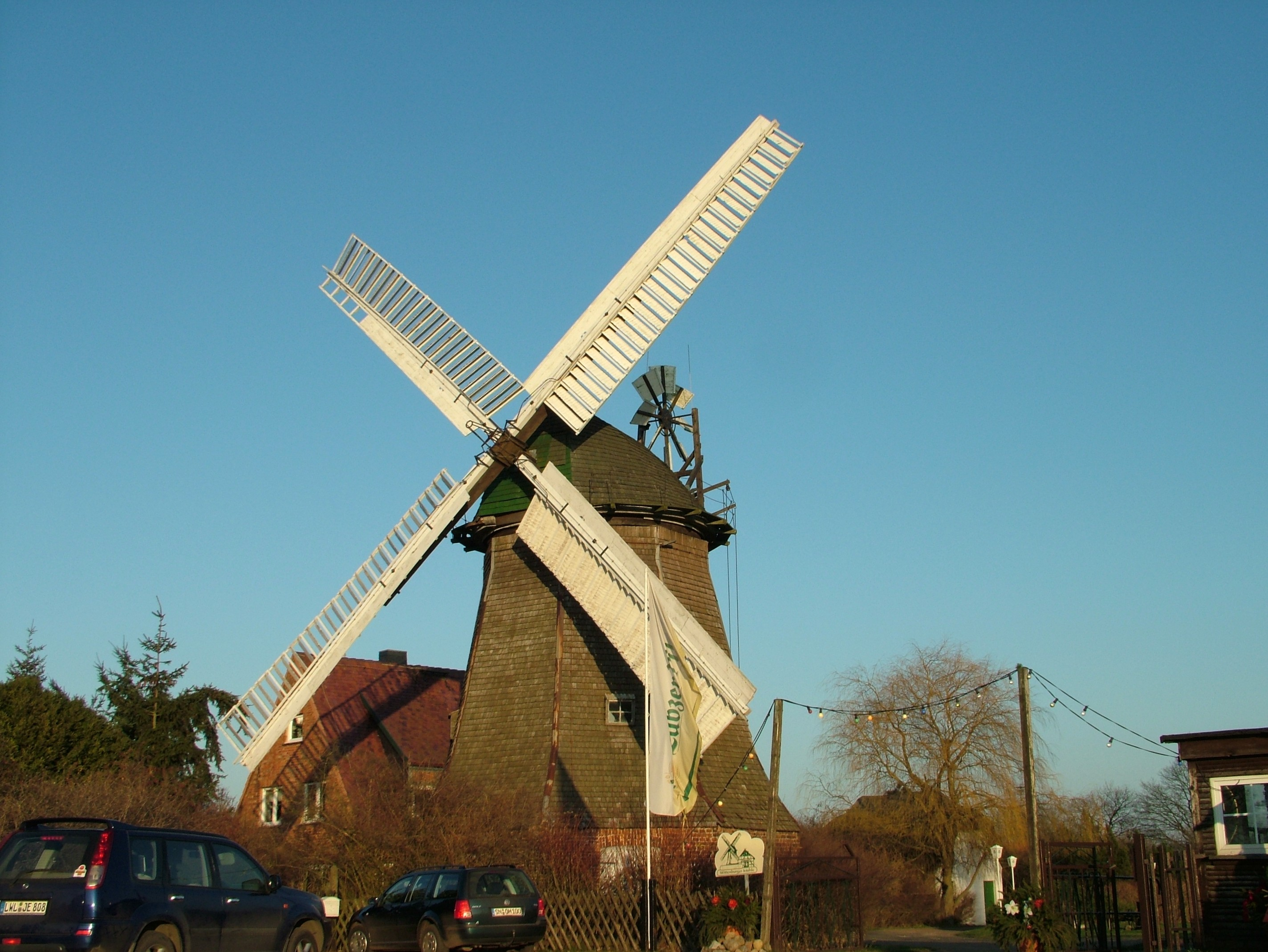 Wittenburg, Mecklenburg-Vorpommern, Deutschland, die Mühle